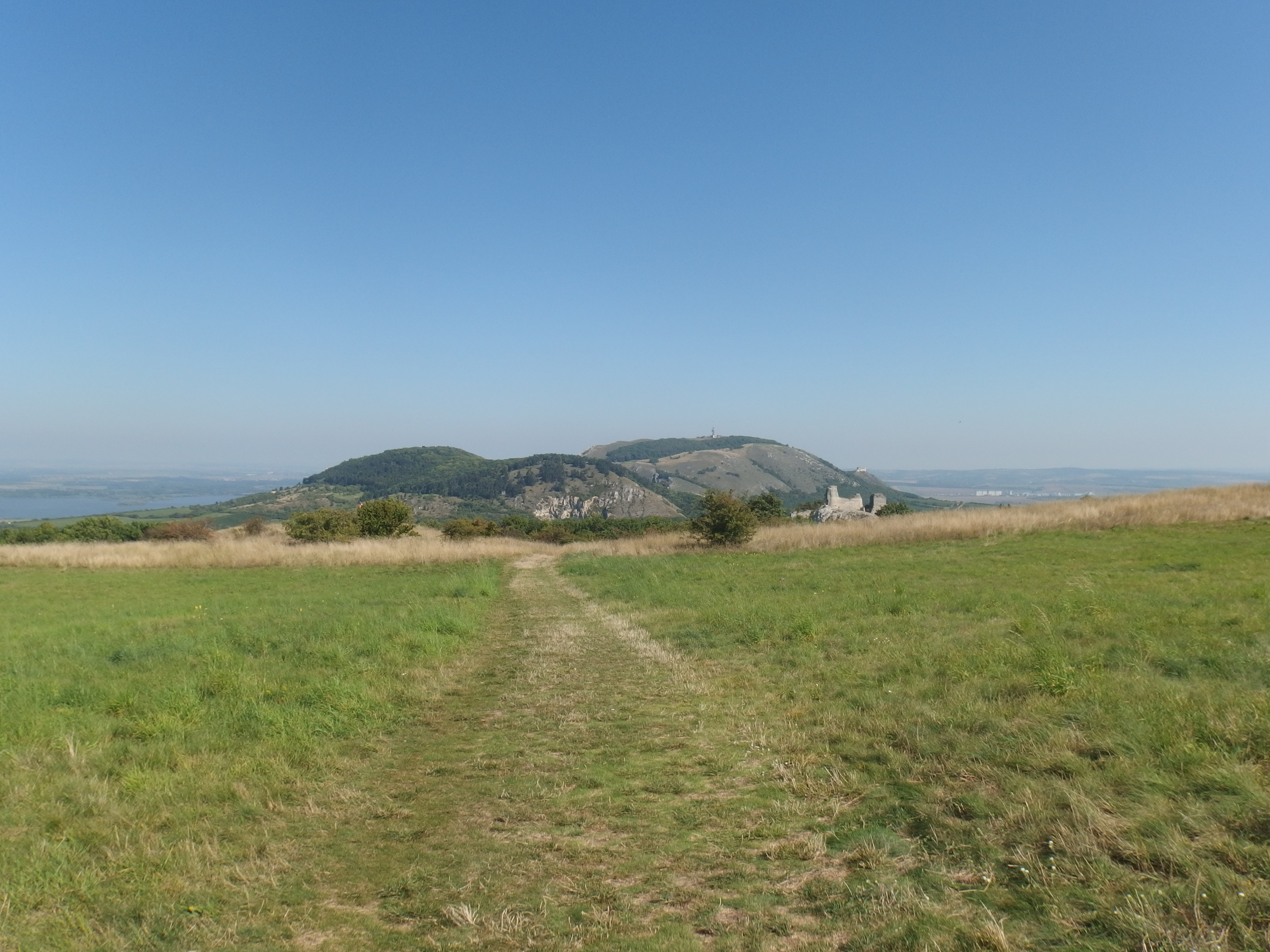 CHKO Pálava, přírodní rezervace Tabulová, Růžový vrch a Kočičí kámen.